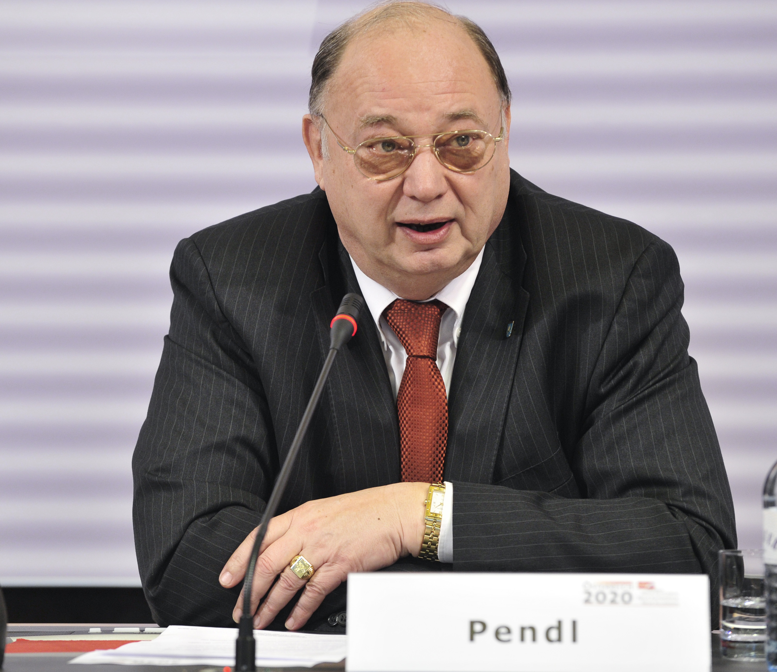 Otto Pendl bei der Österreich2020-Enquete des SPÖ Parlamentsklubs zum Thema 'Versuchungen zu sozialen Netzwerken'